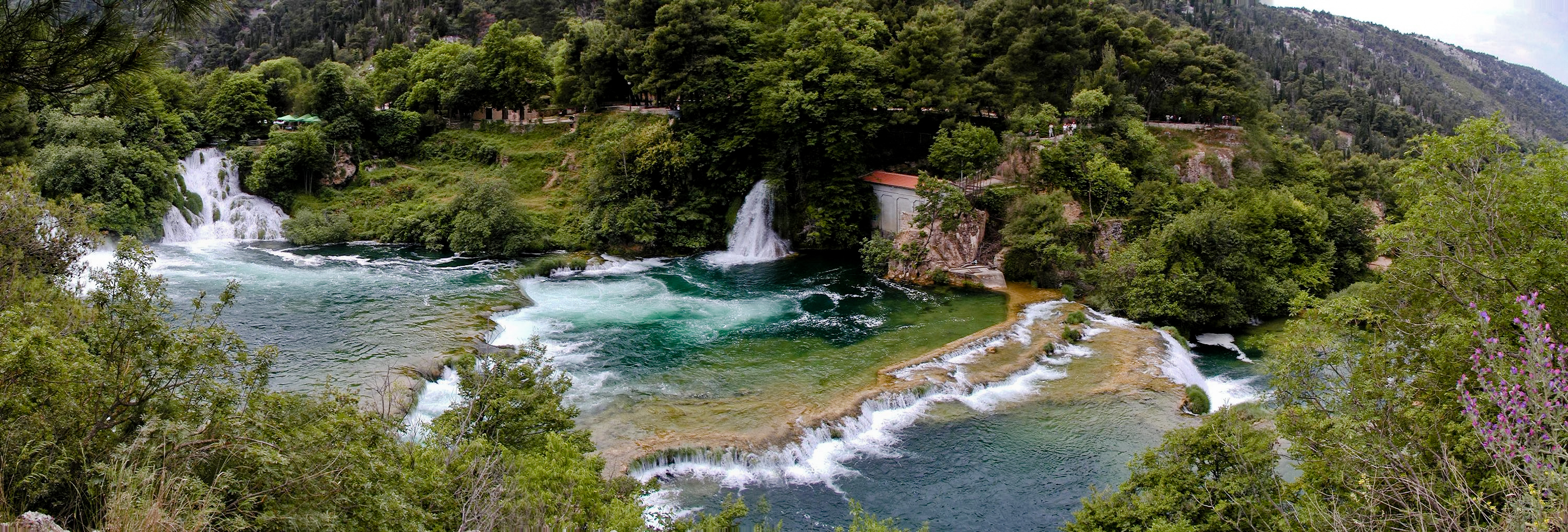 Krka river - Skradinski buk waterfalls.